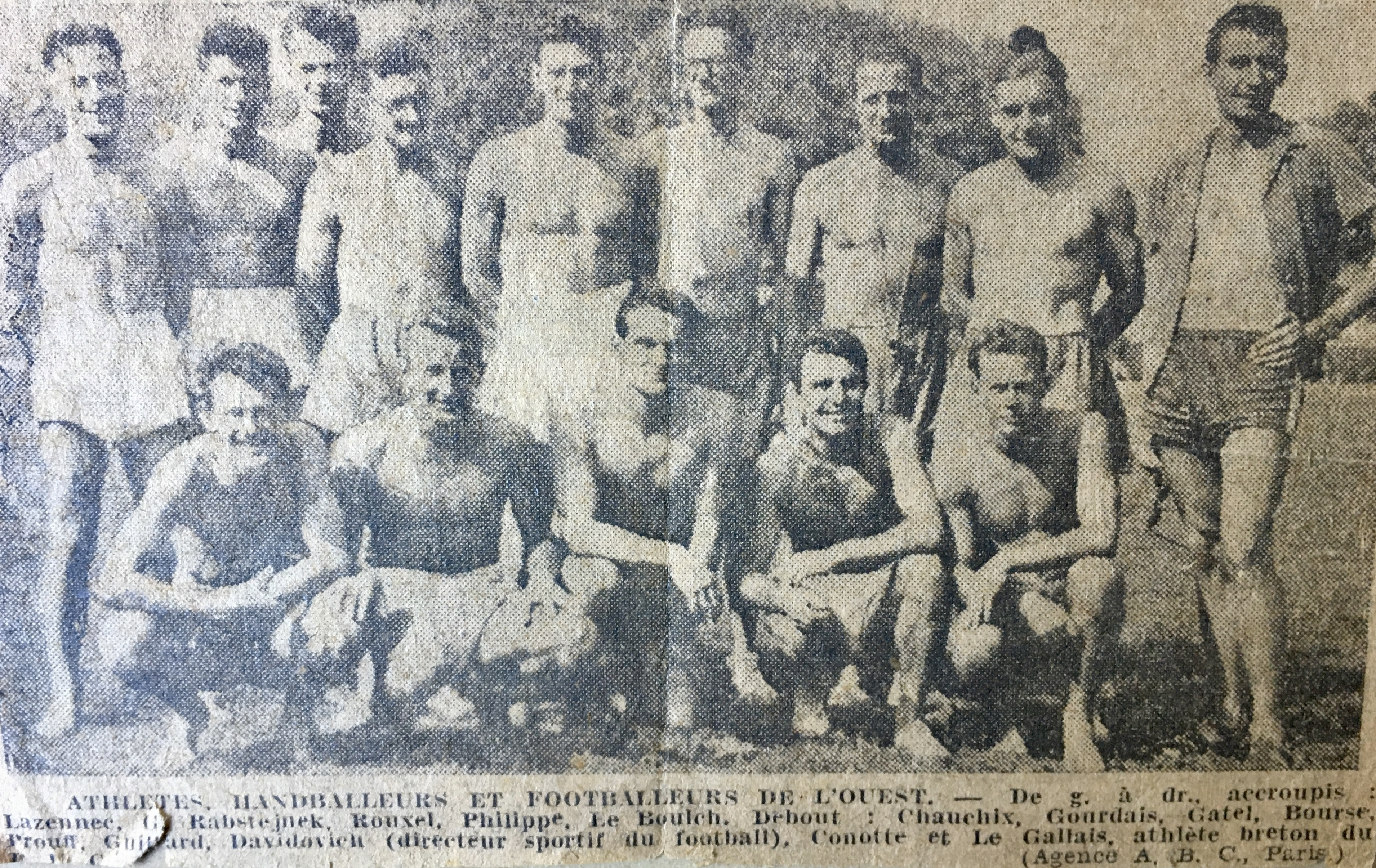 Athlètes, Handballeurs et Footballeurs de l'ouest (Années 40) - Jean Le Boulch accroupis à droite